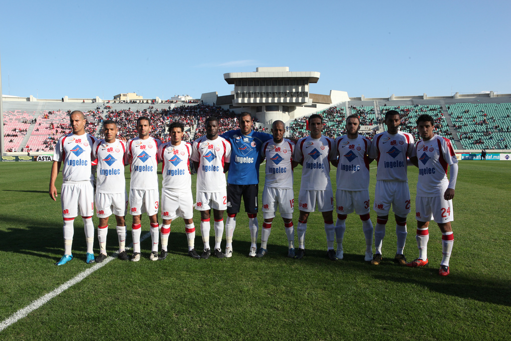 Équipe du Wydad de Casablanca saison 2009-2010 avant le match face au WAF